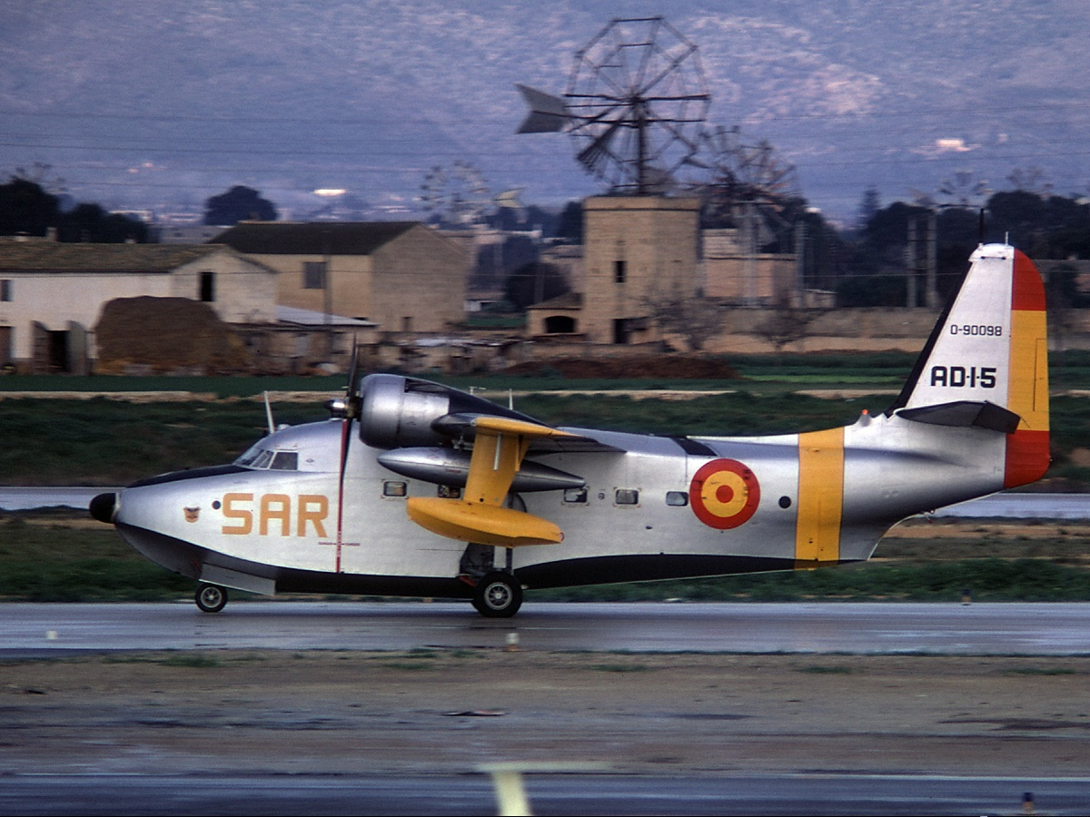 AD1-5 (cn 56) Former USAF 49-0098 at Palma de Mallorca (- Son San Juan) (PMI / LEPA / LESJ)